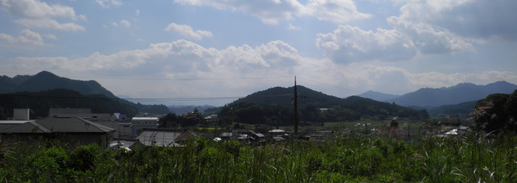 宇陀山地。宇陀市榛原区の住宅地より南側を望む